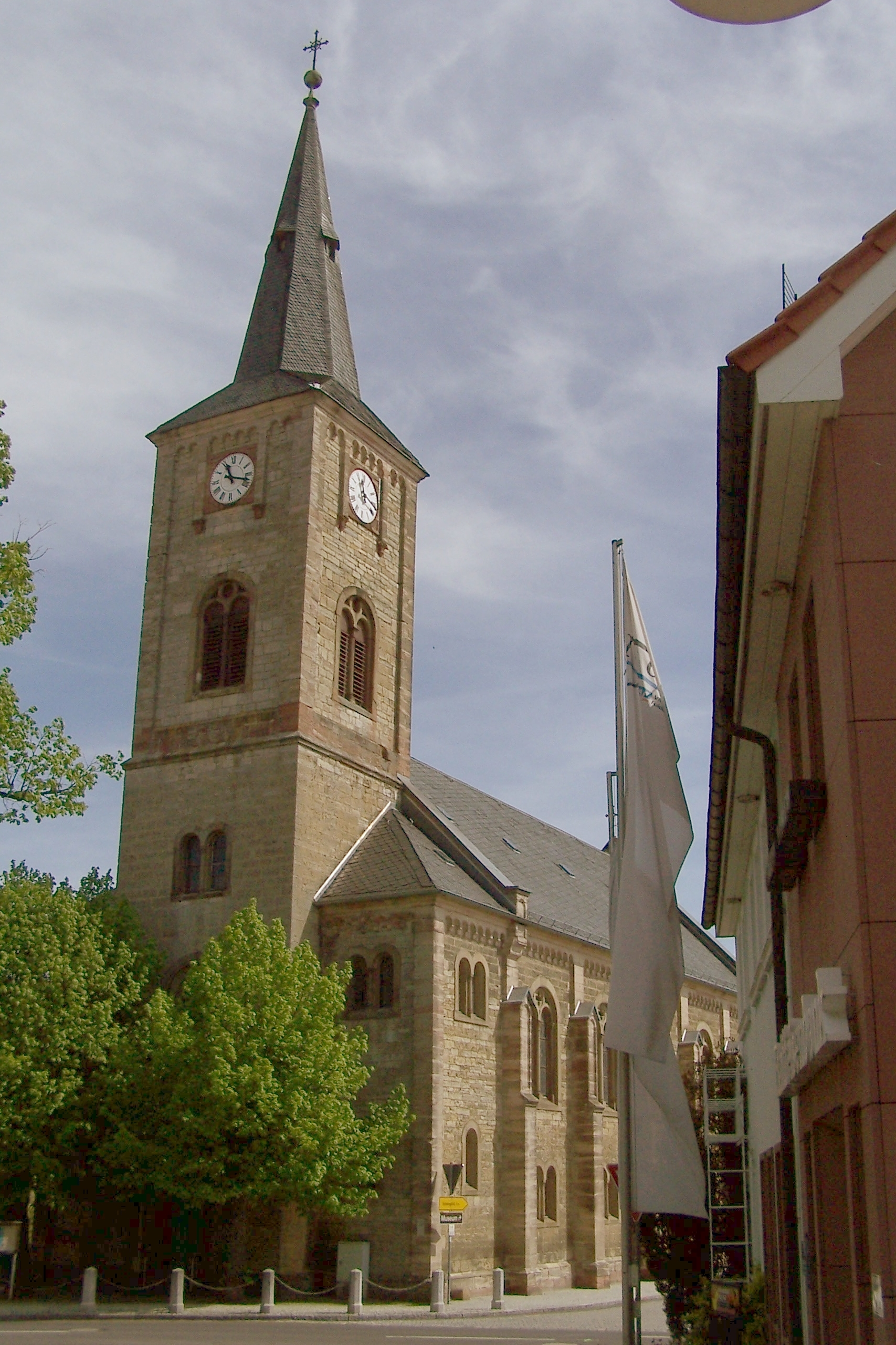 Teilansicht der Kirche von Westen.